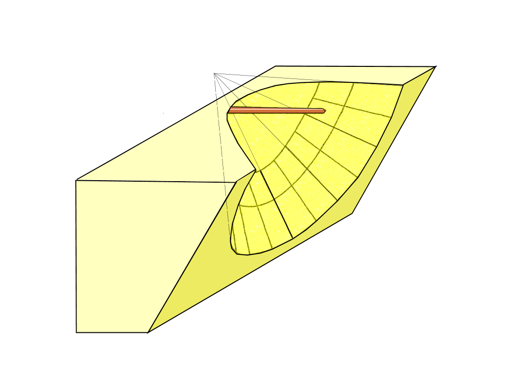 Dessin de cadran antique conique